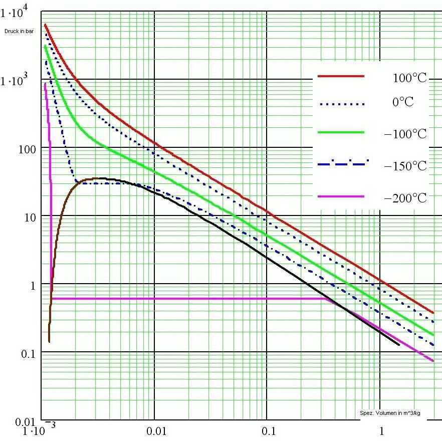 p-v-Diagramm für N2